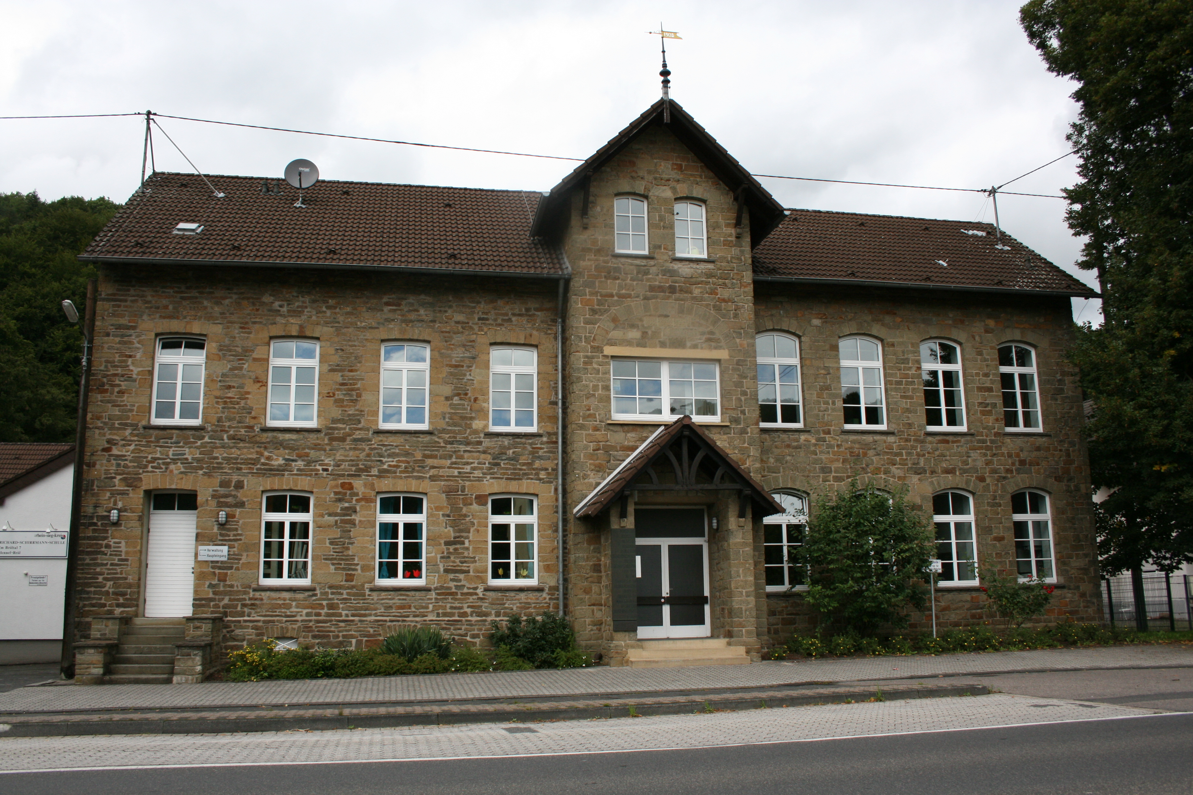 Richard-Schirrmann-Schule in Bröl, Im Bröltal 7, Hennef (Sieg)